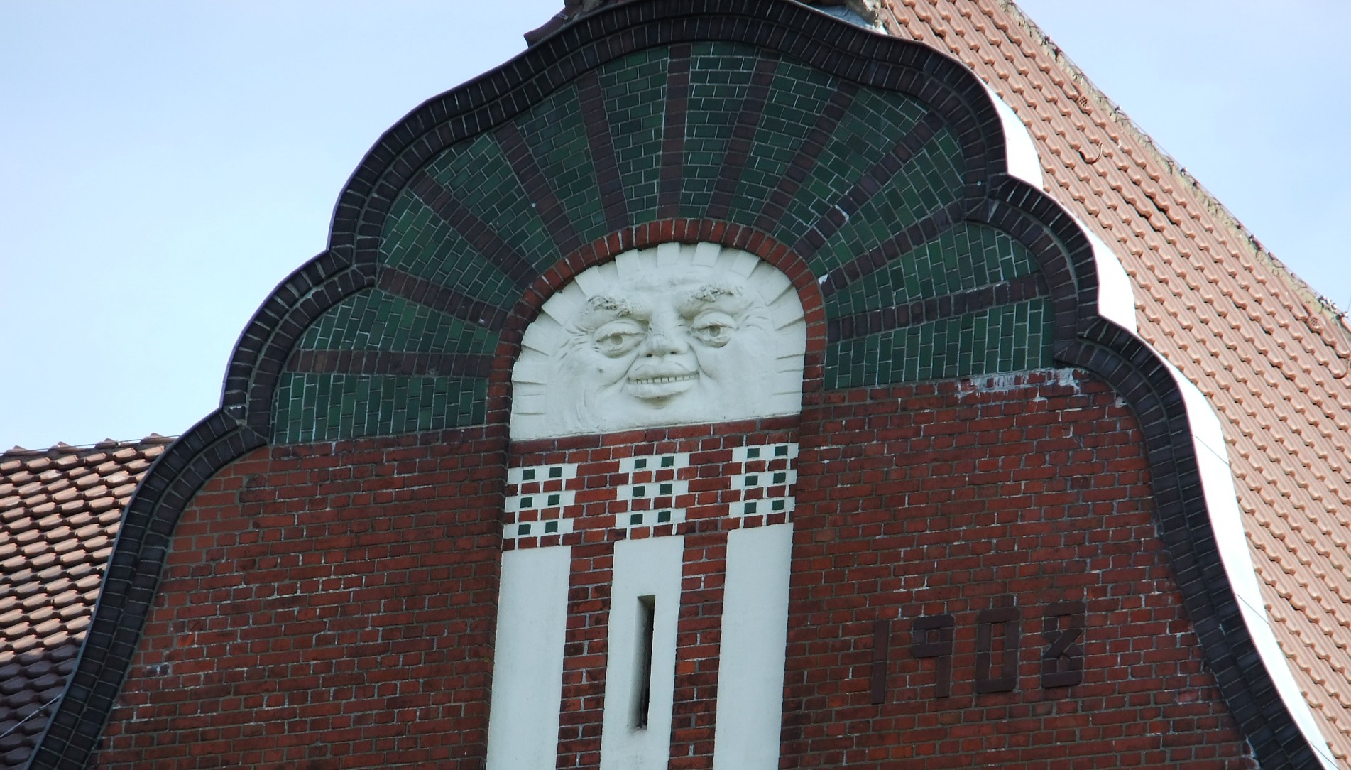 Reform-Real-Gymnasium Geestemünde, Raabe-Schule in Bremerhaven, Friedrich-Ebert-Straße 10.